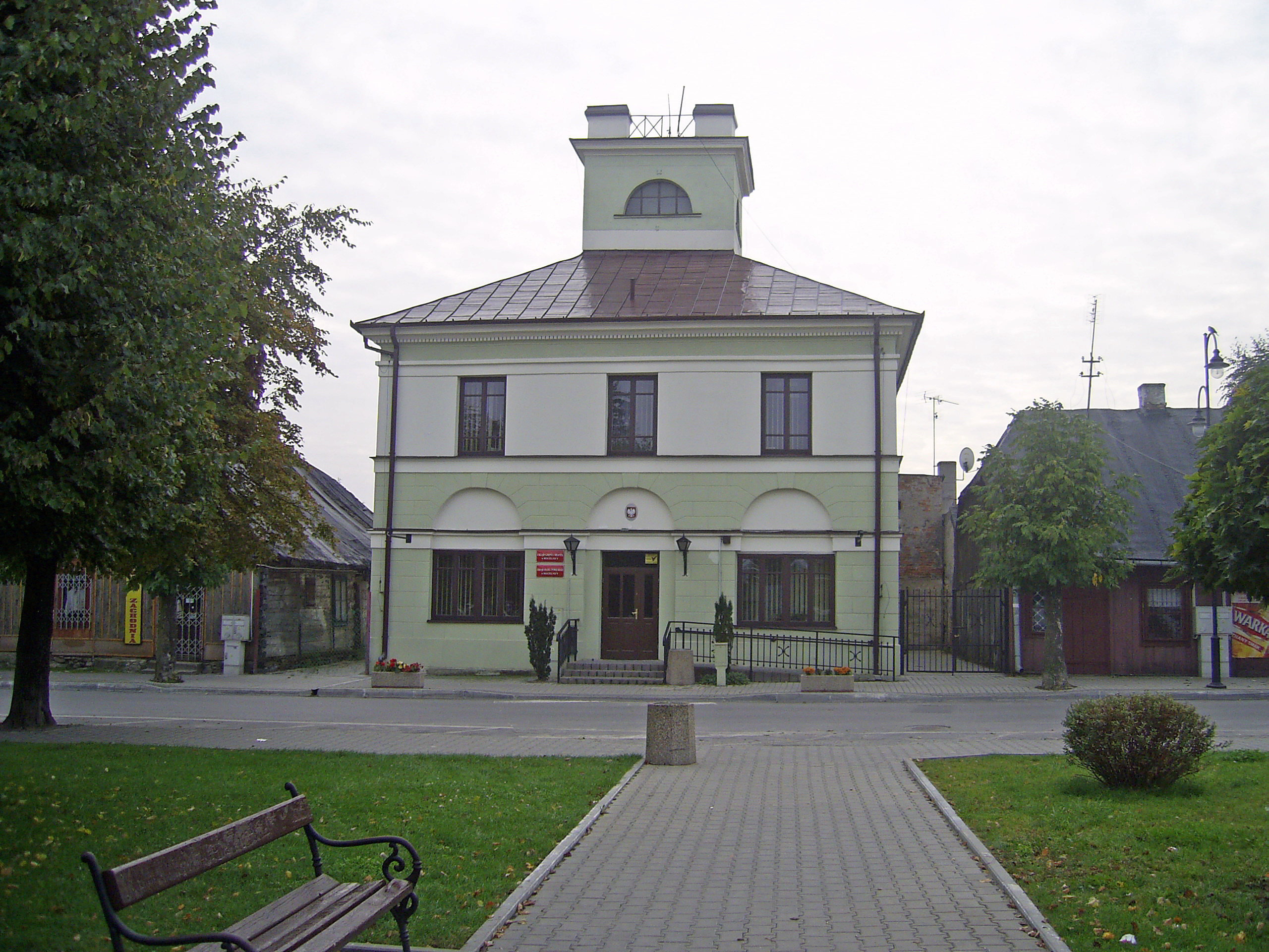 Klasycystyczny ratusz w Mogielnicy